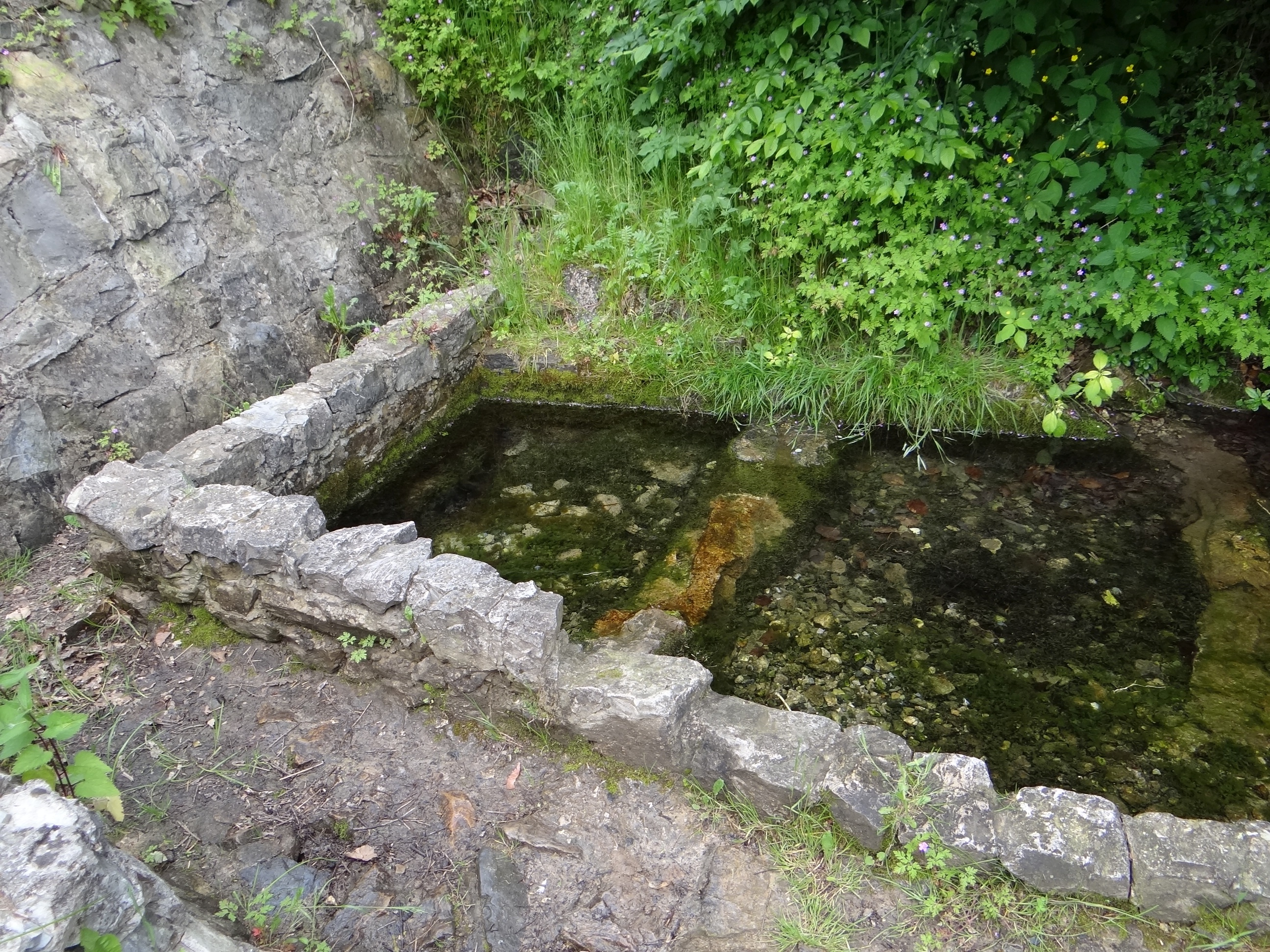 Źródło Pióro w Dolinie Szklarki